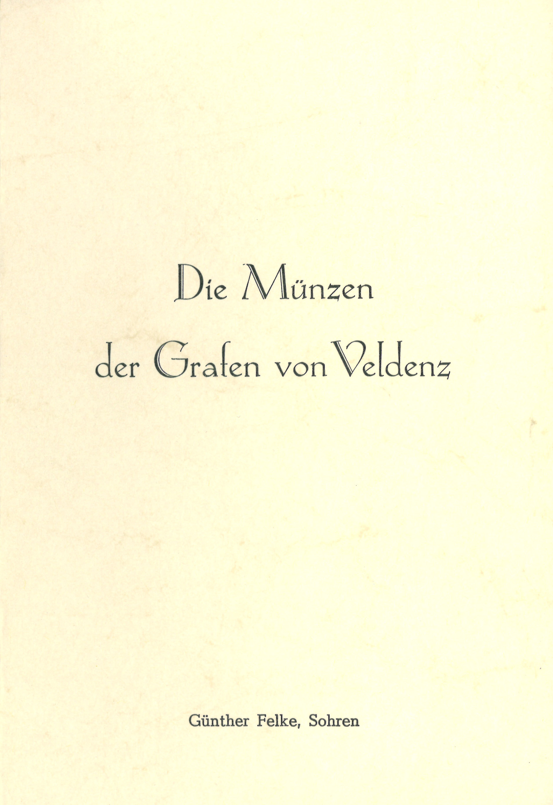 Cover der Publikation "Die Münzen der Grafen von Veldenz" von Günter Felke